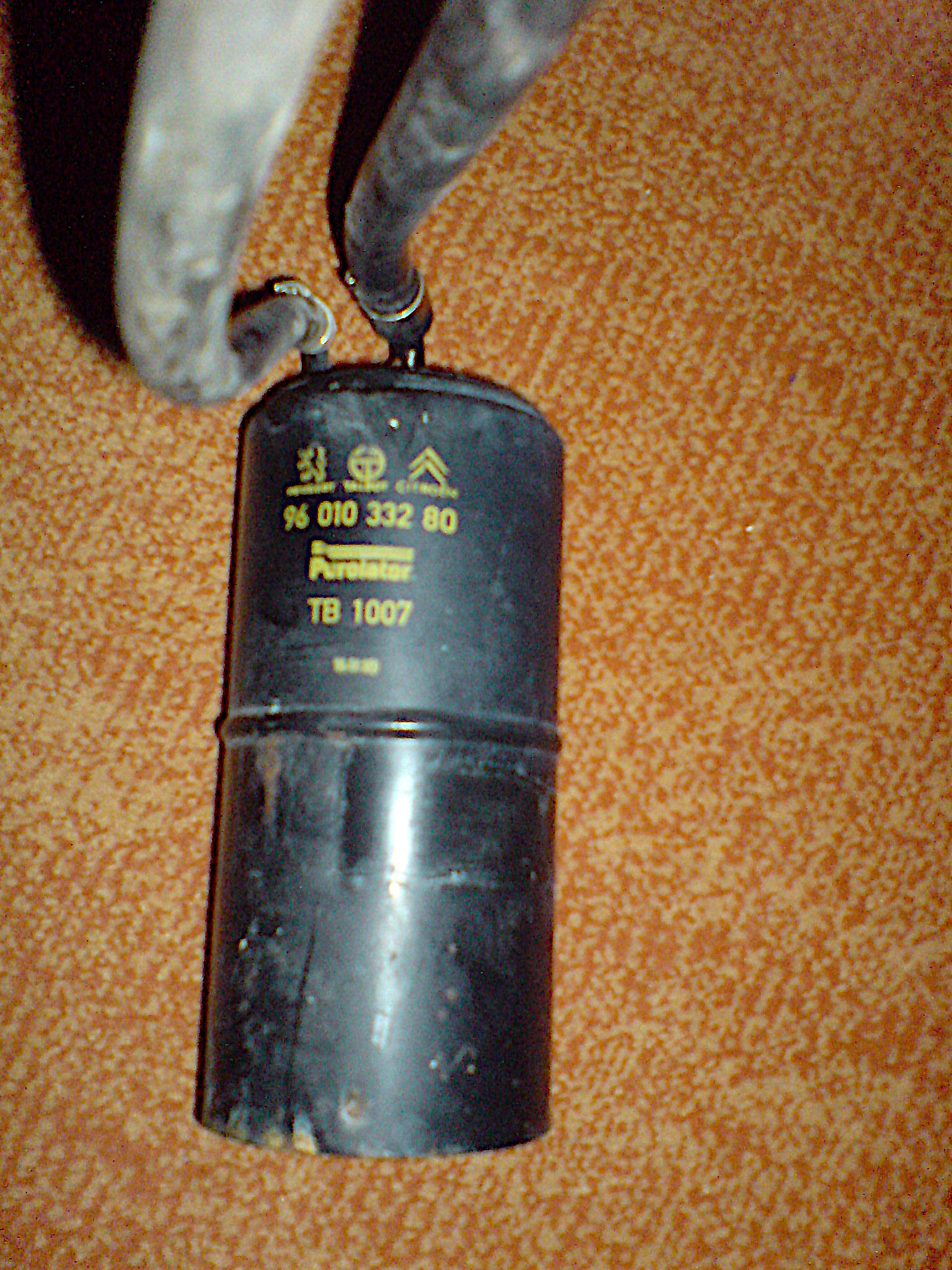 Der Aktivkohlefilter oder Kohlekasten eines Peugeot 205.